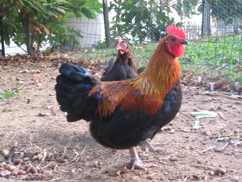 Marans naines NC